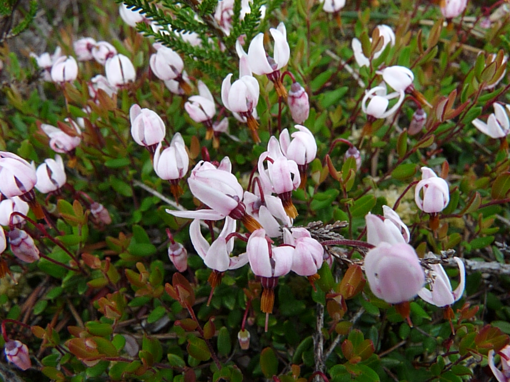 Nõlvasoo hoiuala